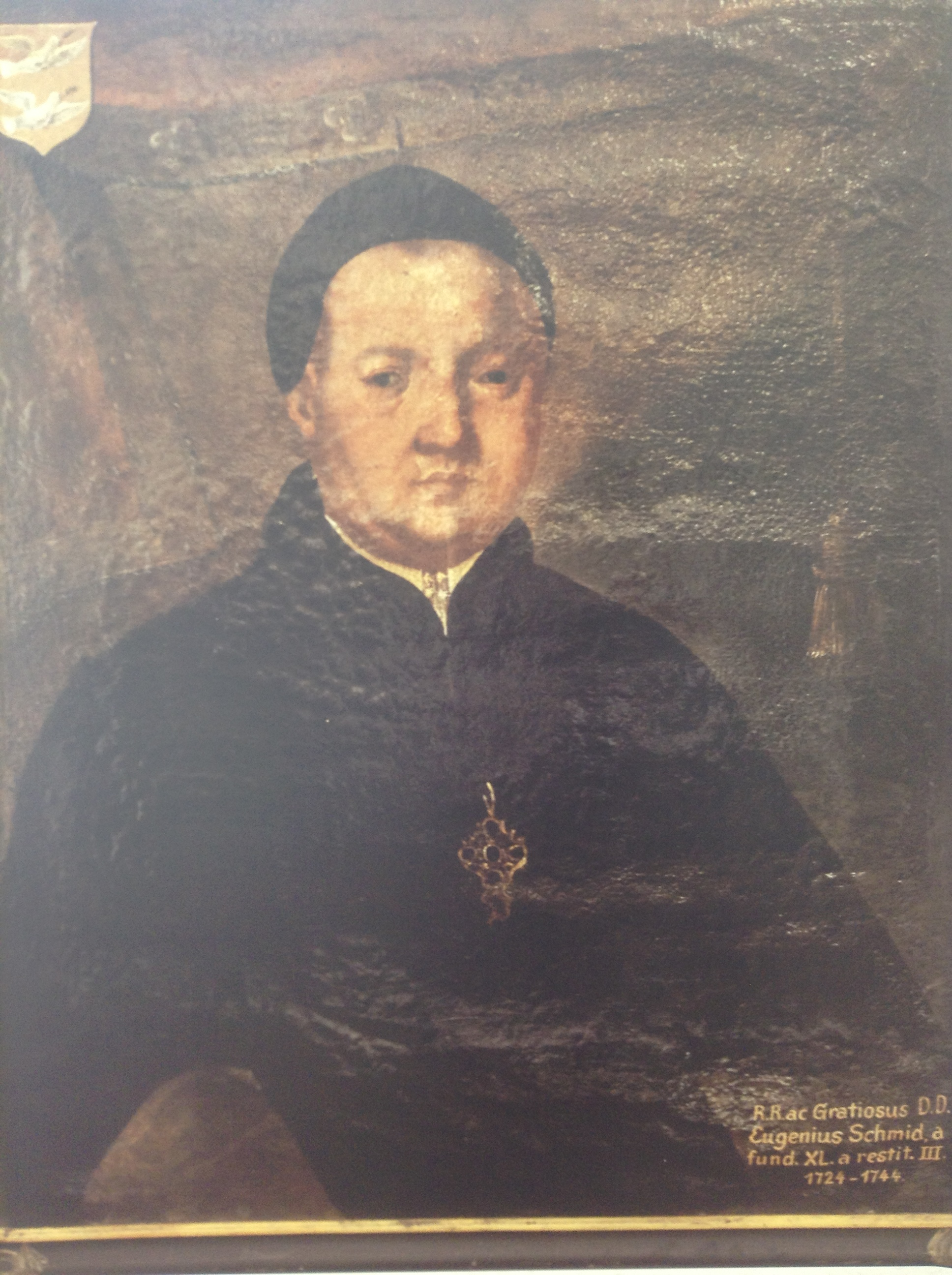 Portrait des Abtes Eugen Schmid (1724 - 1740) aus der Stiftsbibliothek von Waldsassen